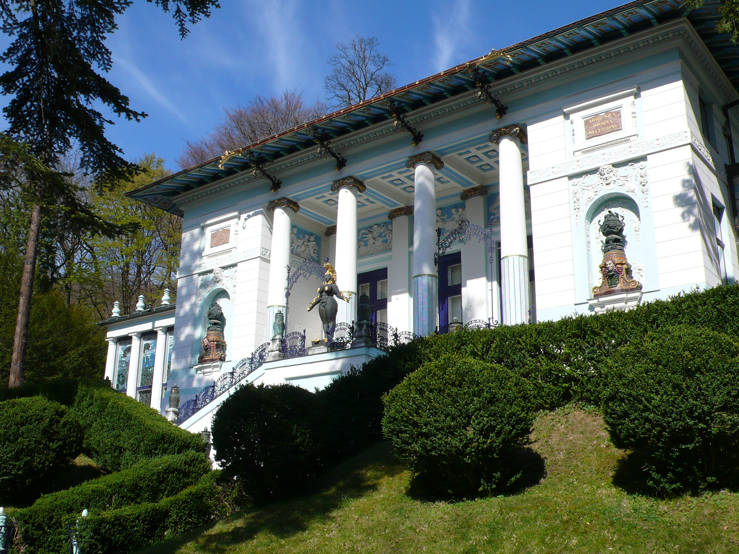 Erste Wagner Villa (Ben-Tiber-Villa) Wien, Otto Wagner